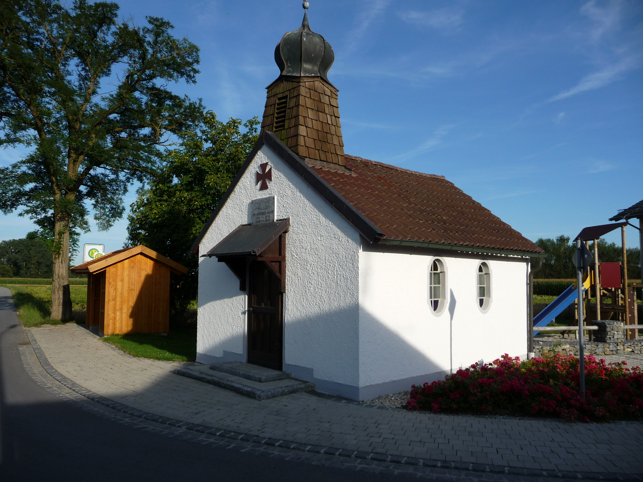 Denkmale in Aholming